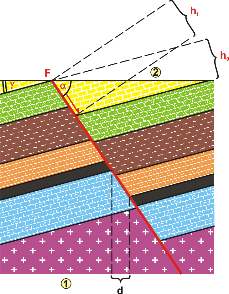 Скид незгідний і його структурні елементи: 1 - лежаче крило, 2 - висяче крило, F - площина зміщувача, h0 - істинна амплітуда скиду, hf - амплітуда по зміщувачу, альфа - кут падіння зміщувача, гамма - кут падіння пластів, d - зіяння пласта